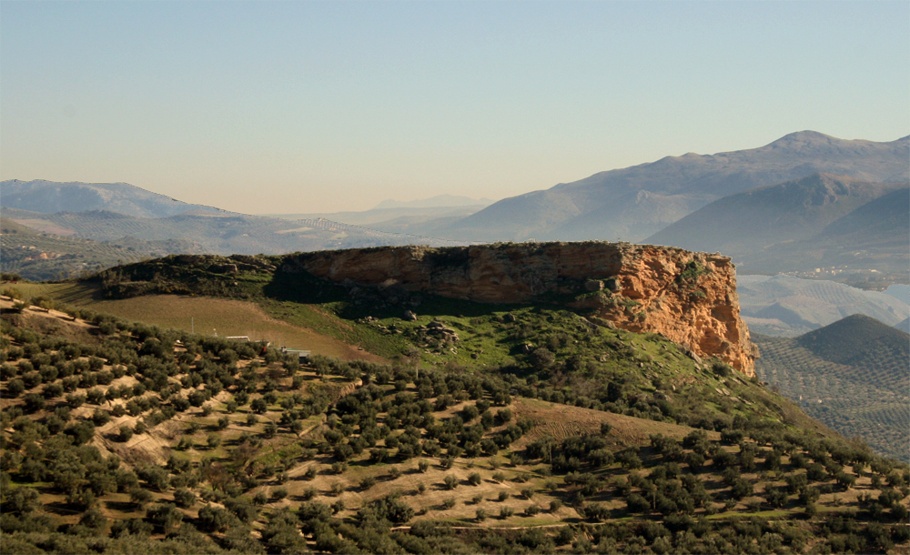 Villavieja Tajo